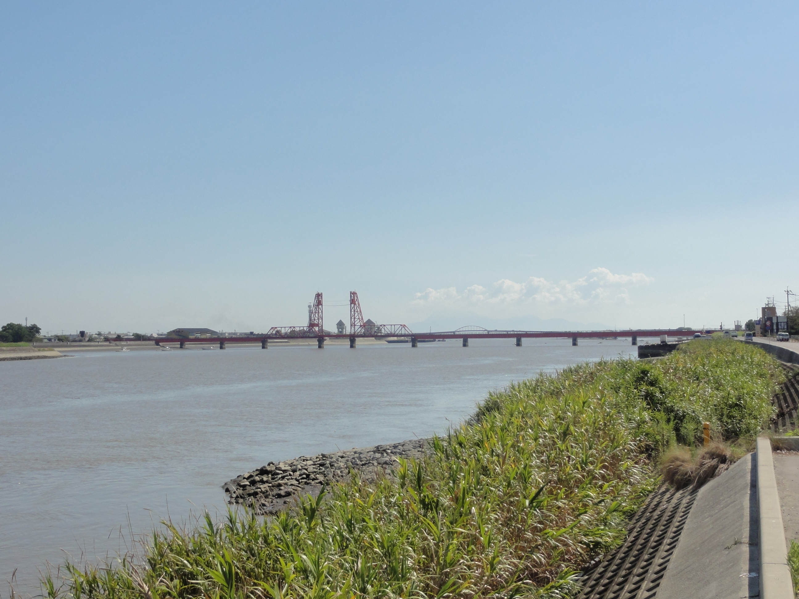 筑後川昇開橋